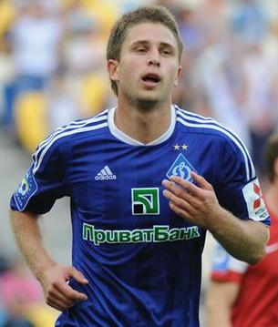 Артем Кравець - український футболіст під час виступів за Динамо (Київ)